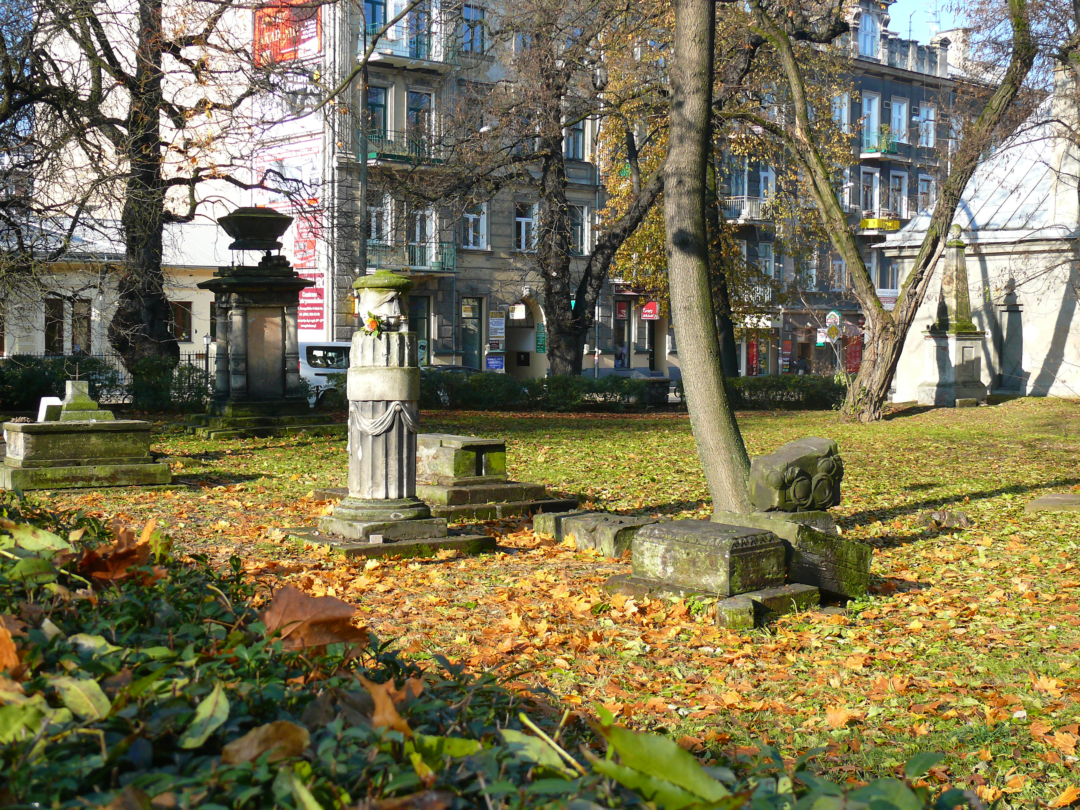 cmentarzyk przy kościele parafii ewangelickiej w Lublinie